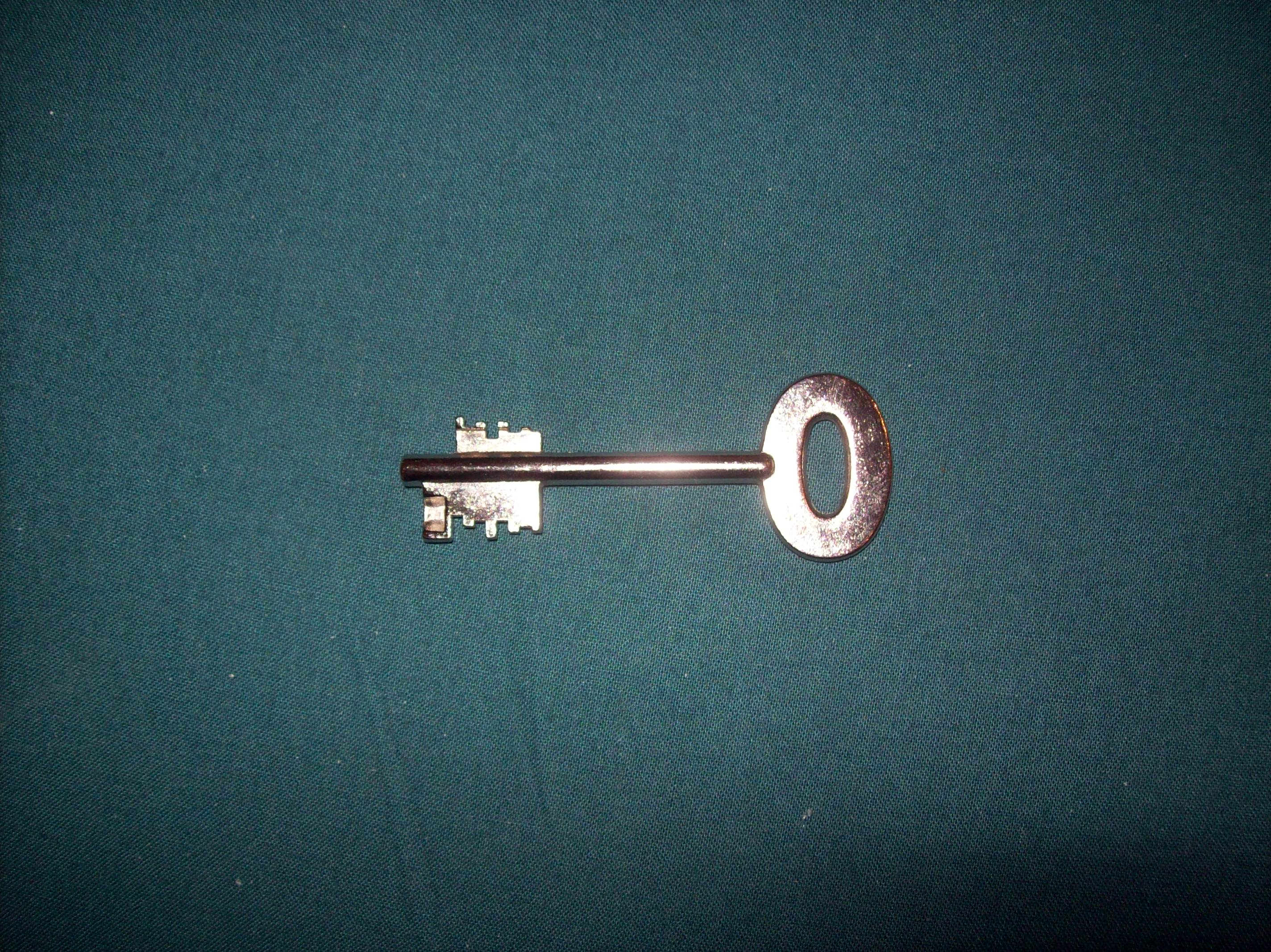 Doppelbartschlüssel